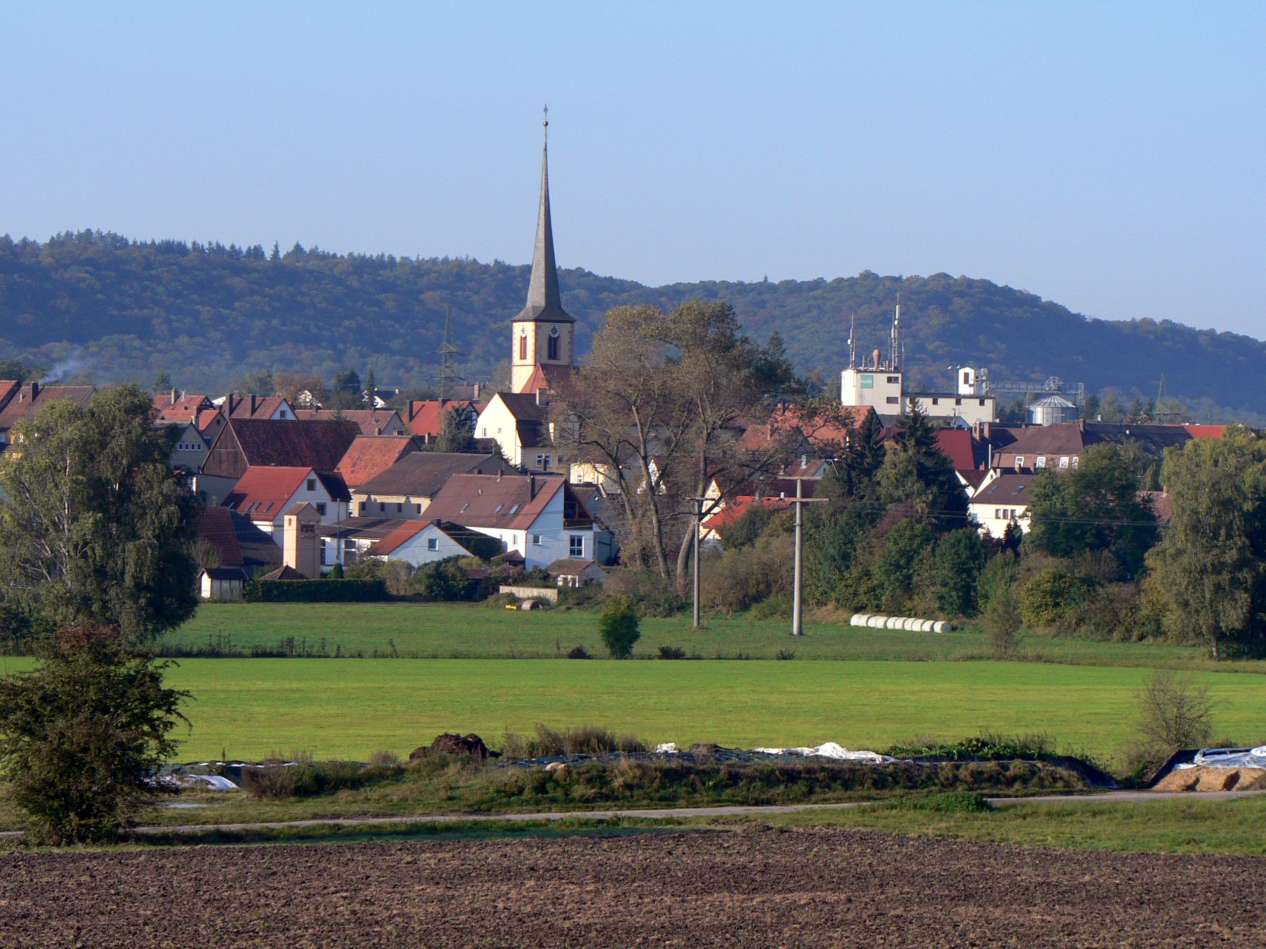 Nordost-Ansicht von Markt Bibart